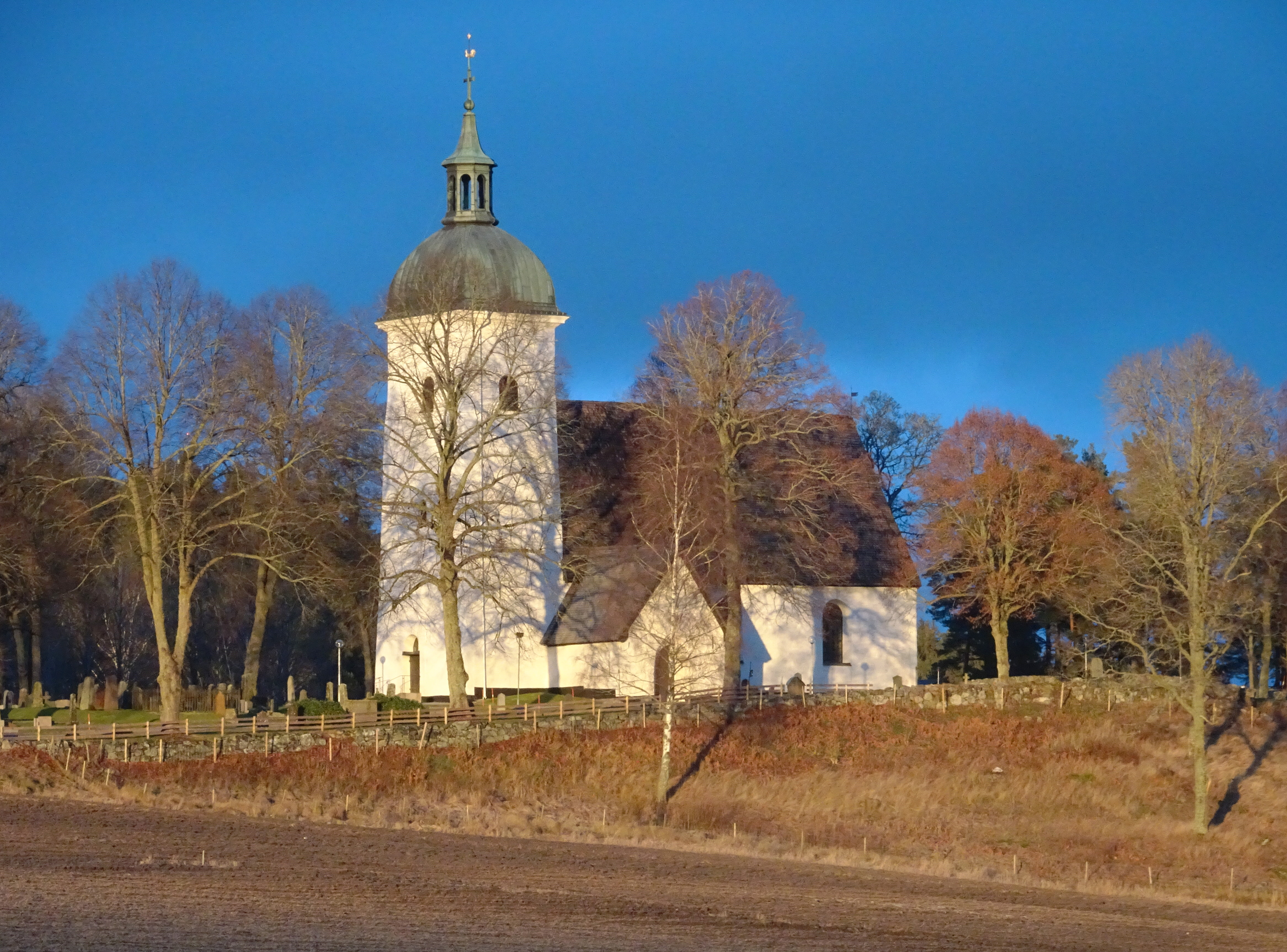 Grödinge kyrka